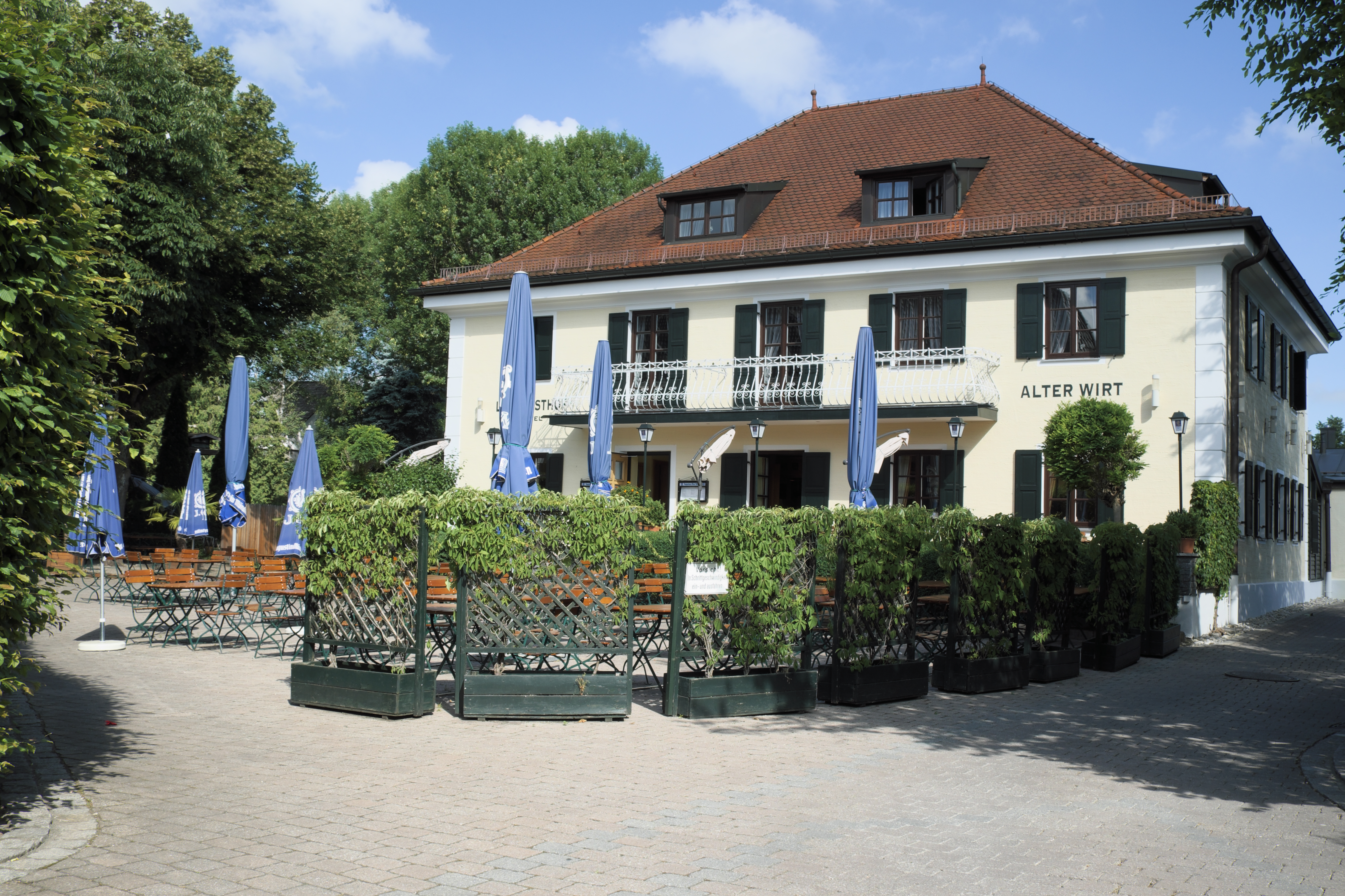 Gasthof Alter Wirt in Unterschleißheim im Landkreis München (Bayern, Deutschland)